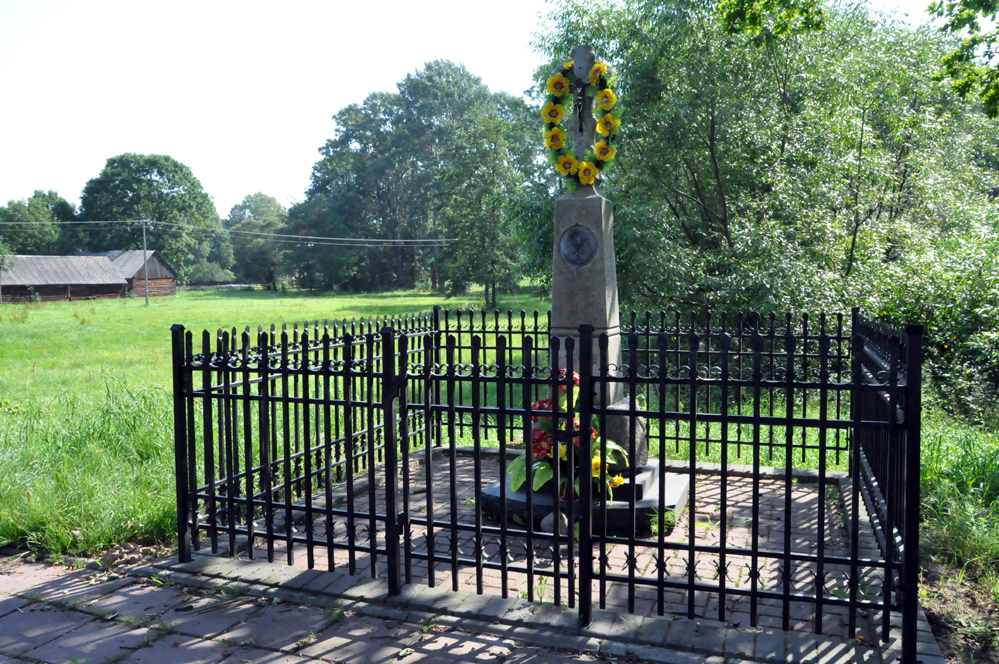 Krzyż przydrożny